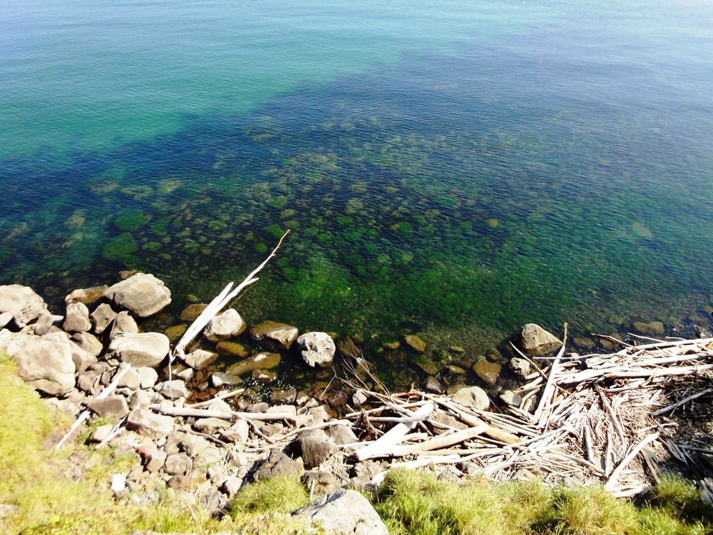 Татарский пролив